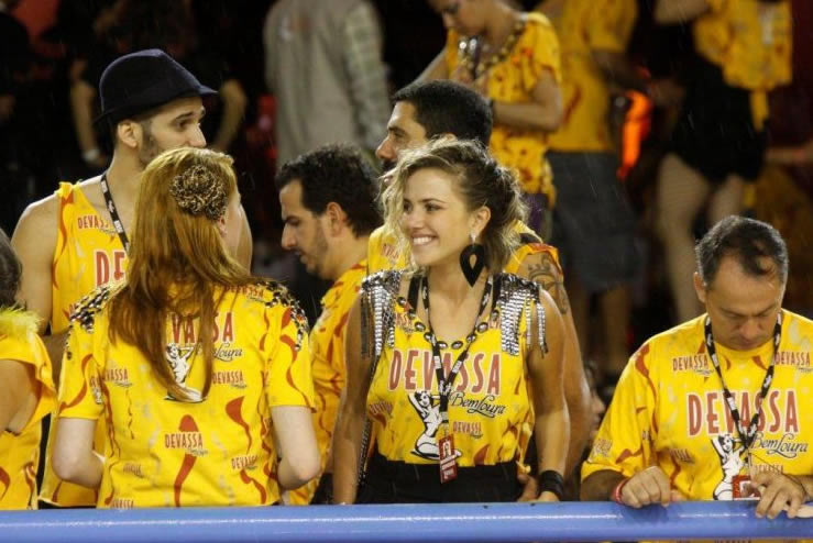 A atriz Nathalia Rodrigues assiste em camarote ao desfile das escolas de samba do Rio de Janeiro.